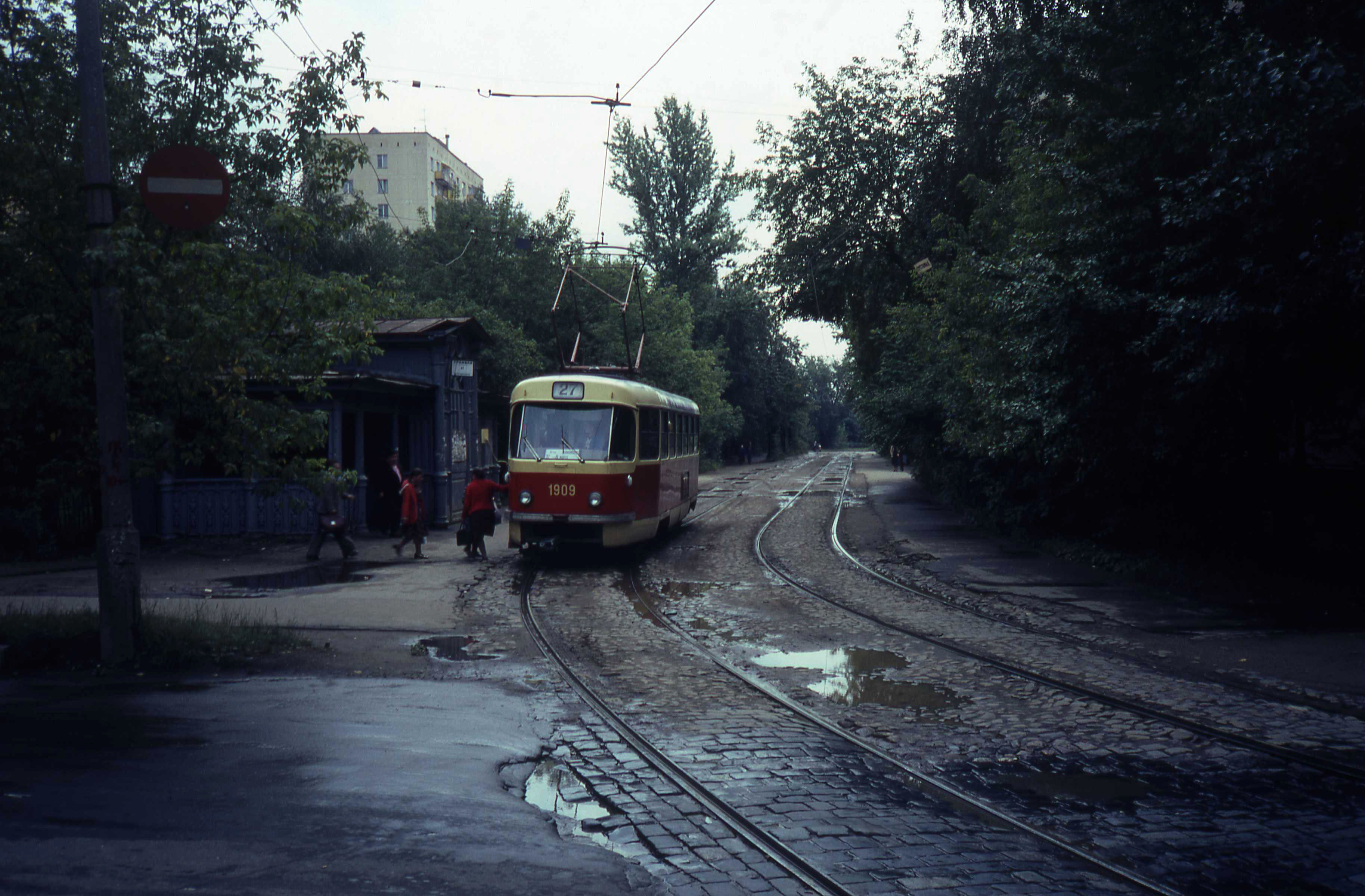 Tram 27 bij het eindpunt